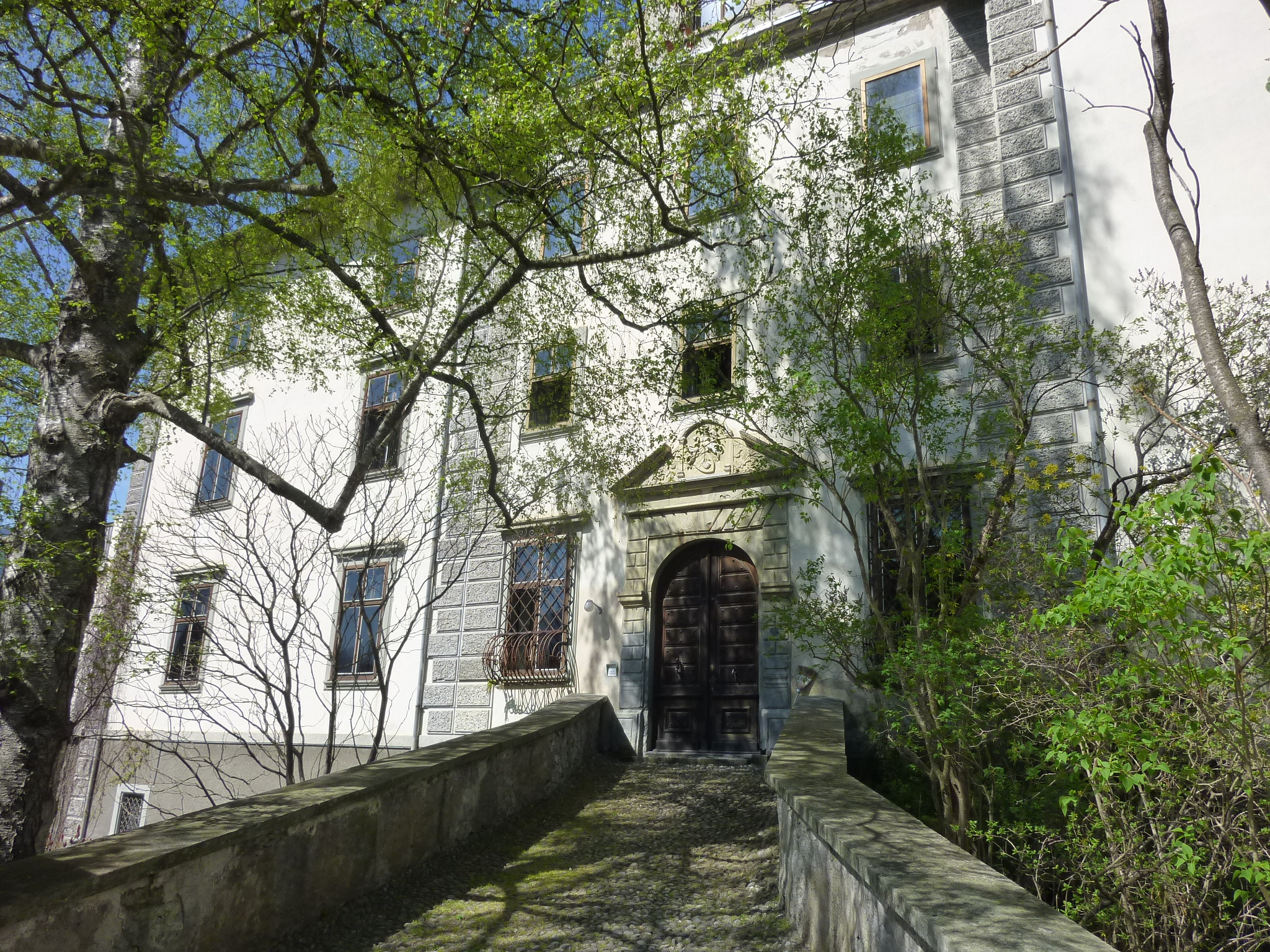 Bischöfliches Schloss Schauenstein Vorderseite